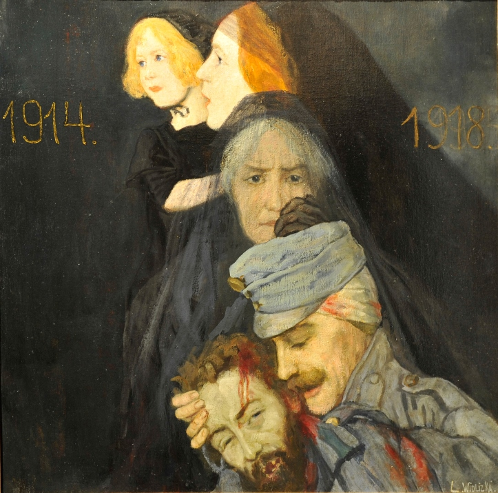 Ölgemälde Familienschicksal im Wiener Heeresgeschichtlichen Museum